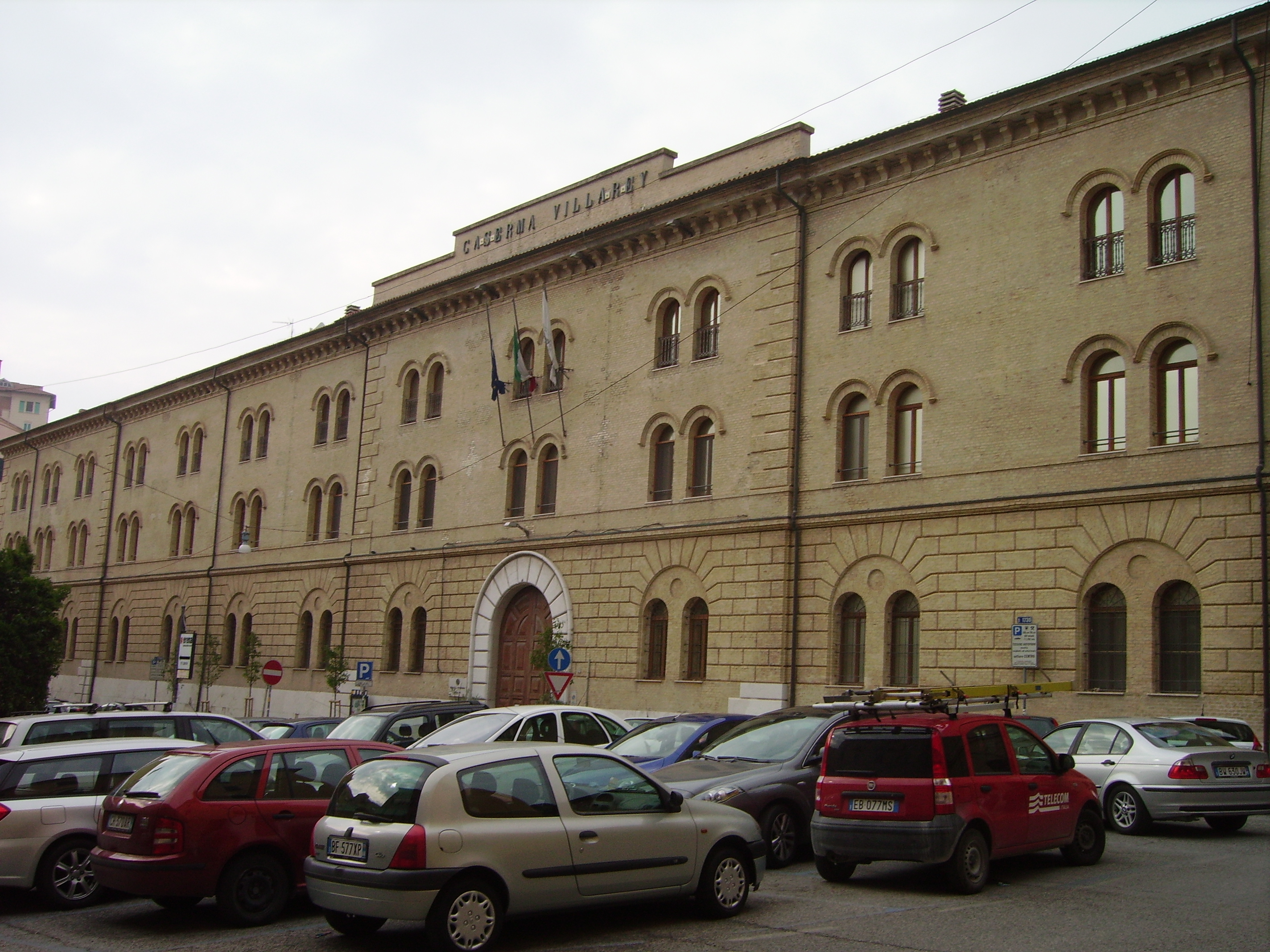 Caserma Villarey ad Ancona, attualmente sede della facoltà di Economia dell'Università politecnica delle Marche.